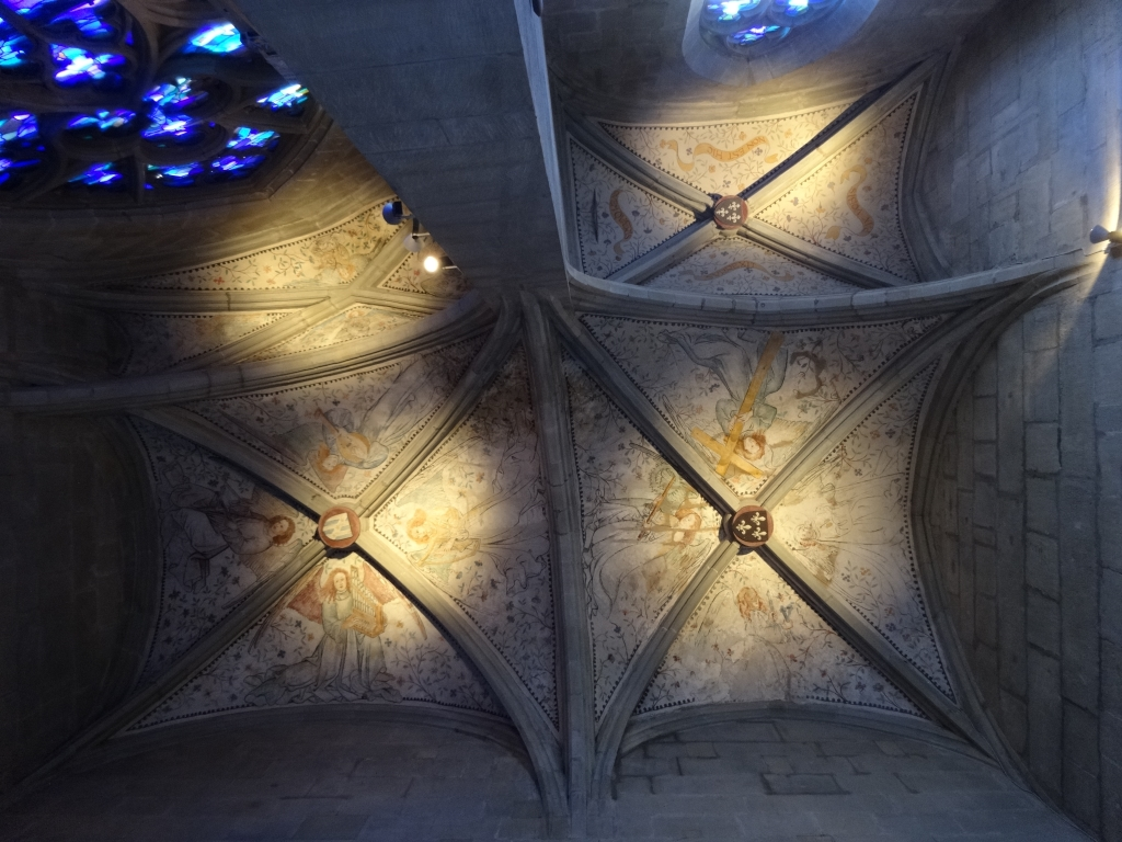 Cathédrale St-Nicolas de Fribourg (Suisse). Peinture des voûtes de la chapelle du Saint-Sépulcre.